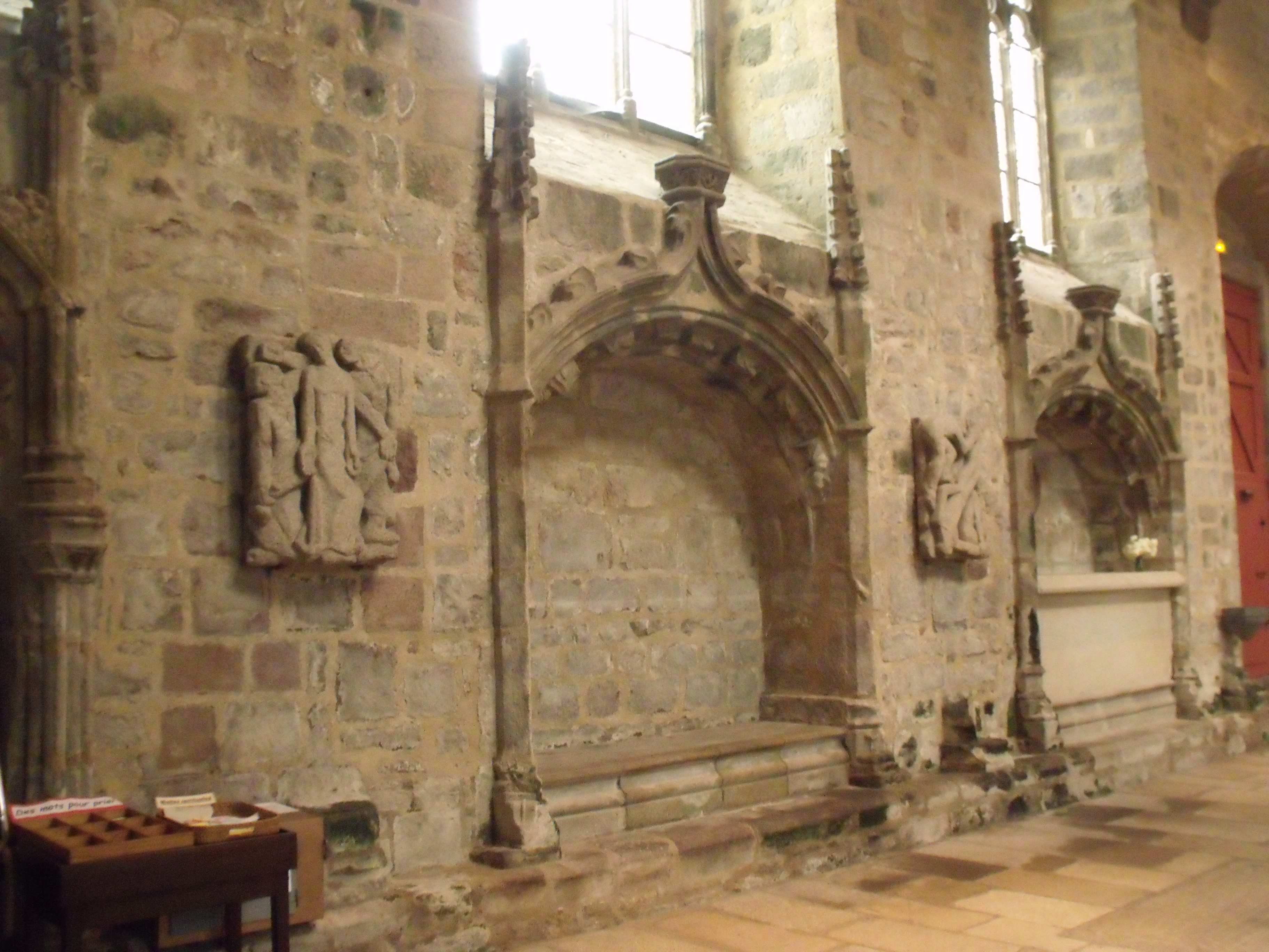 Catedral de San Esteban de Saint-Brieuc